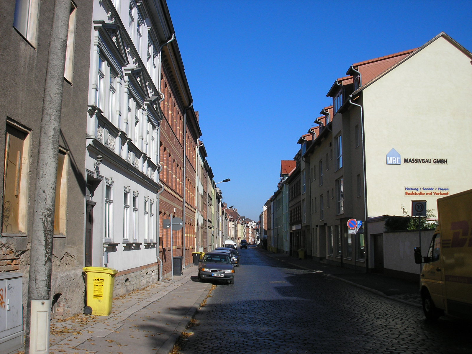 Die Hans-Sailer-Straße in Ilversgehofen in Erfurt.